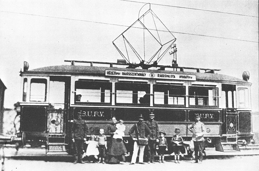 A H járat 109-es számú kocsija